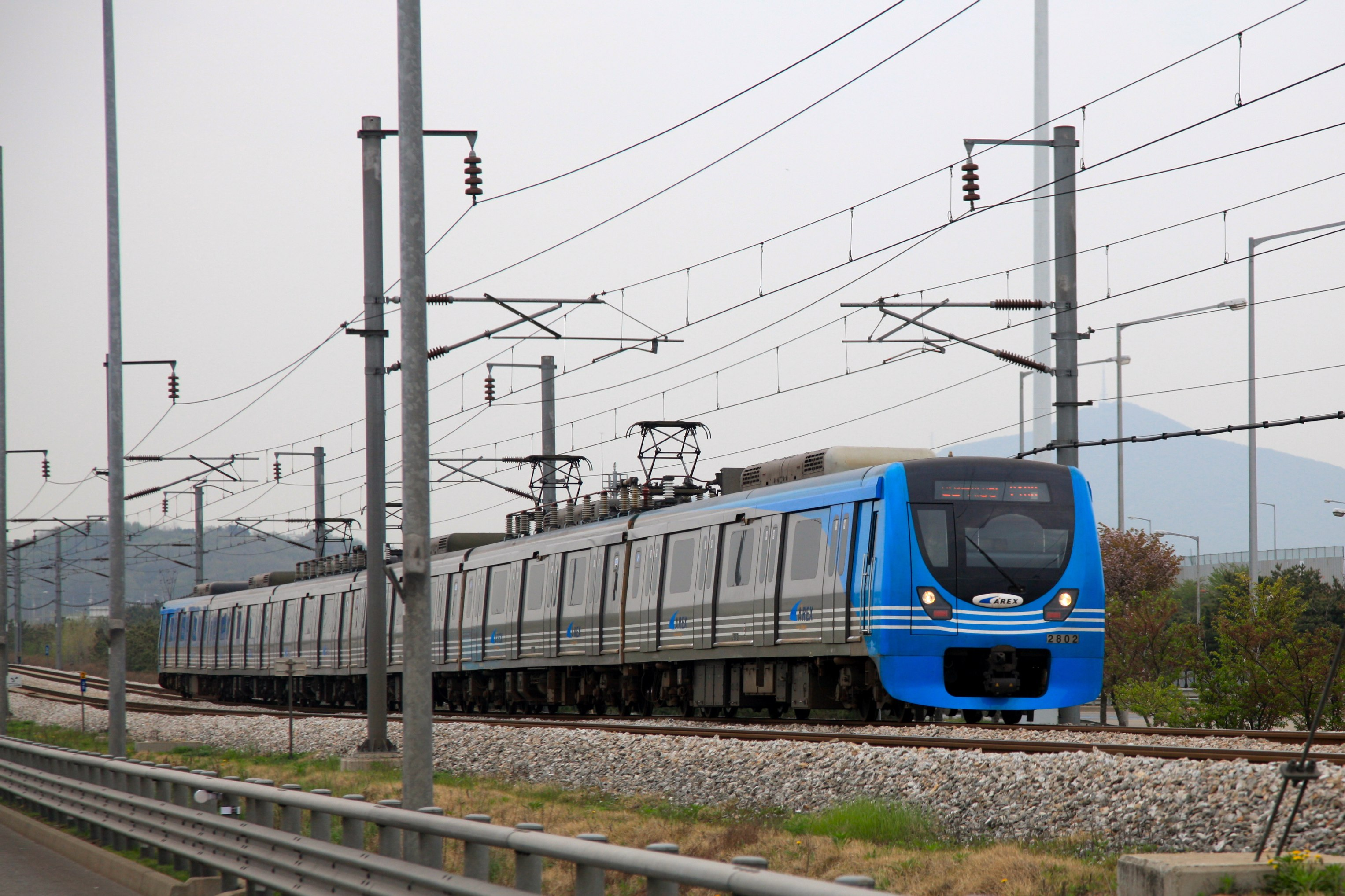 인천공항철도.